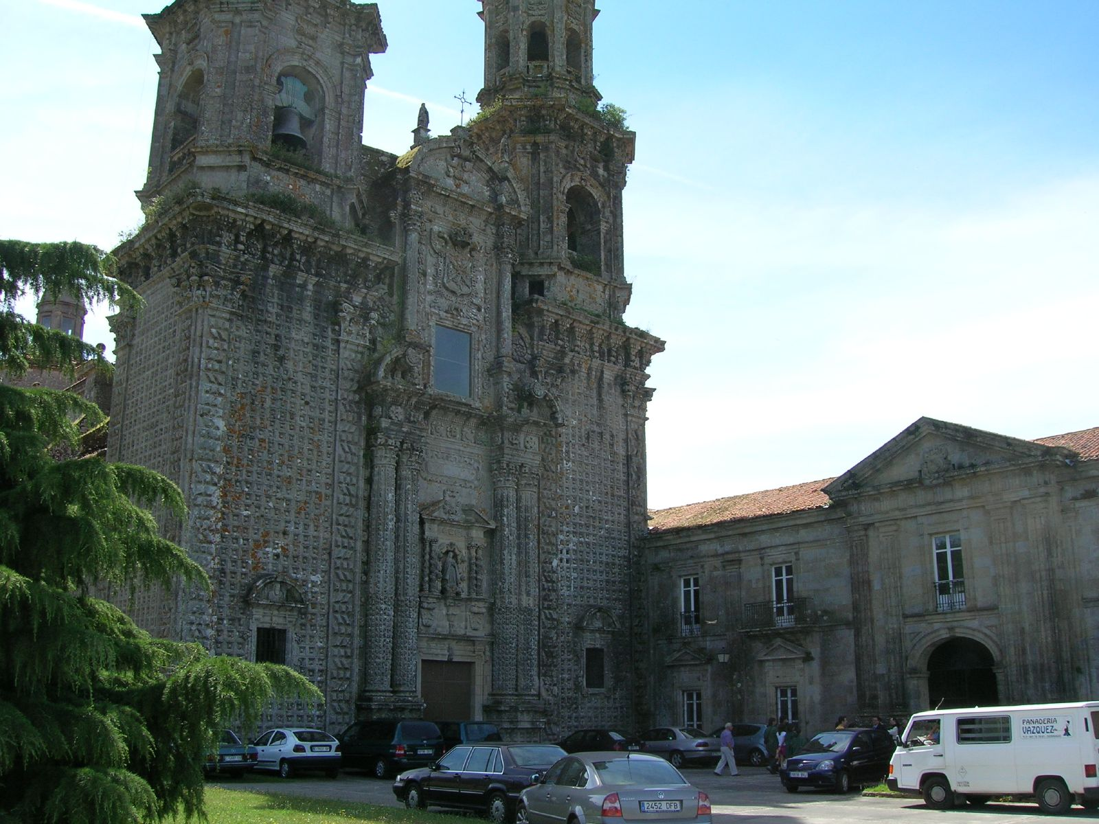 Fachada barroca de la iglesia de 1676 y portada neoclásica de entrada al monasterio.